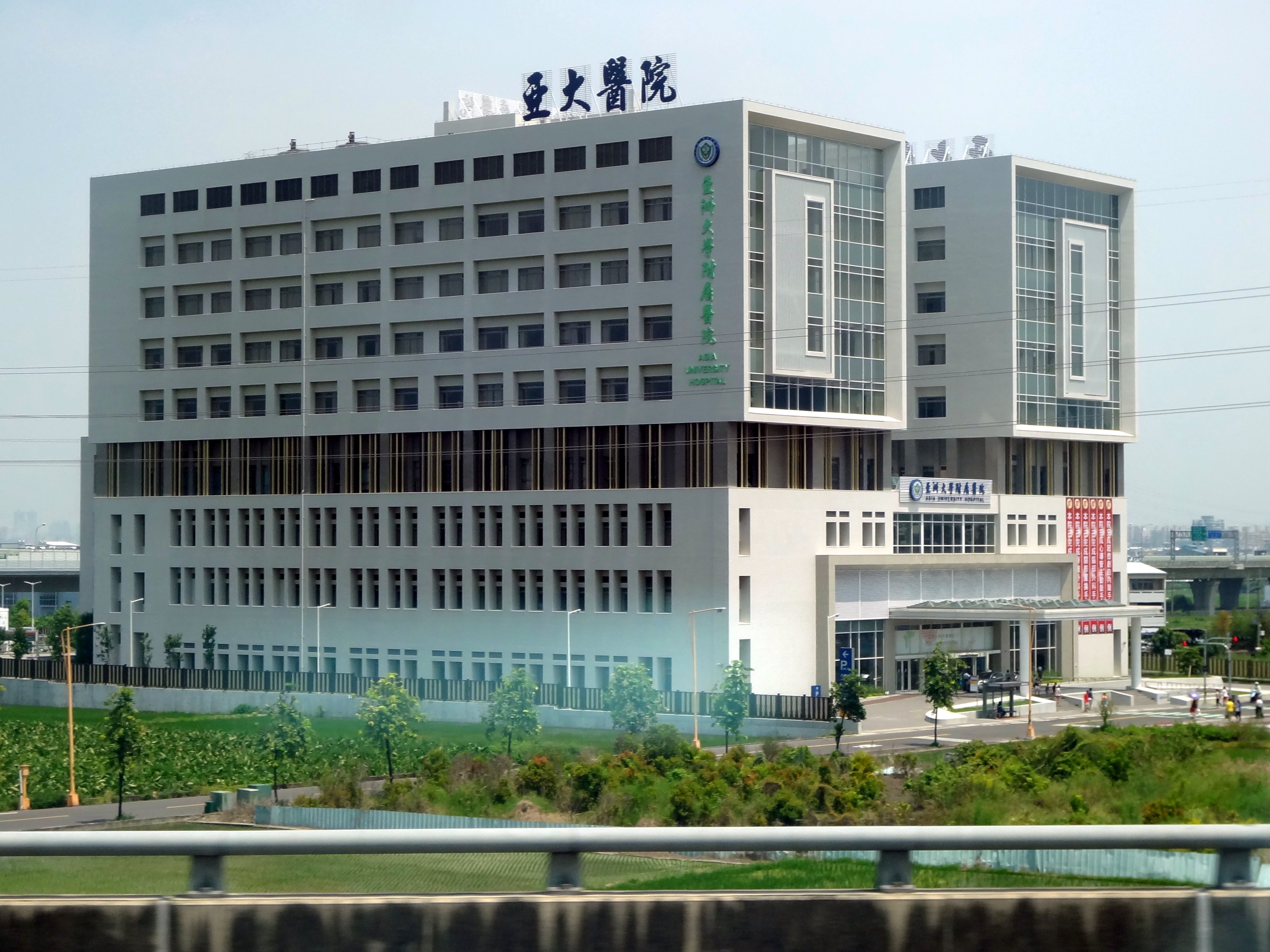 從高速公路遊覽車上拍攝亞洲大學附屬醫院。